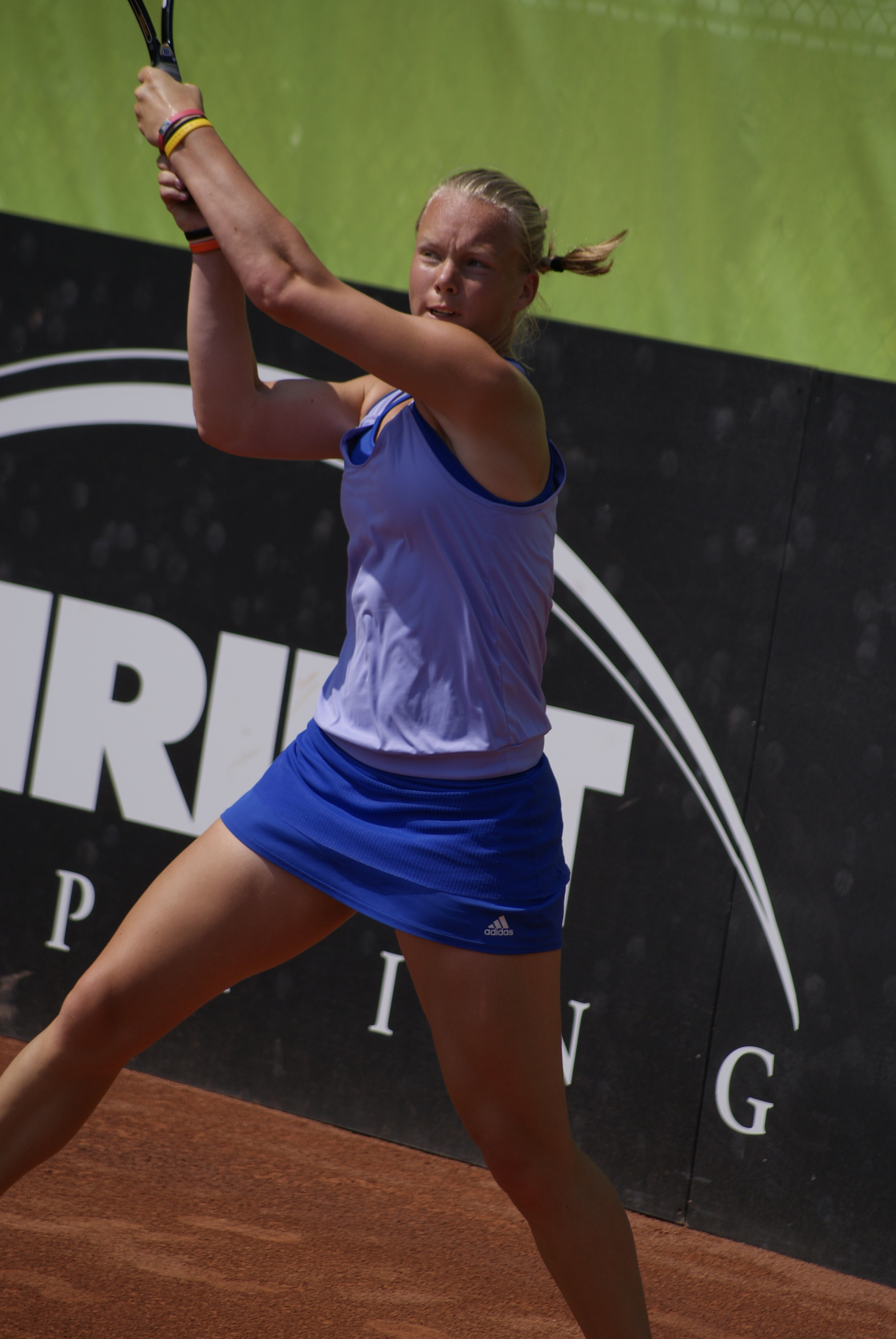 Kiki Bertens (10 december 1991) is een Nederlandse tennisster.